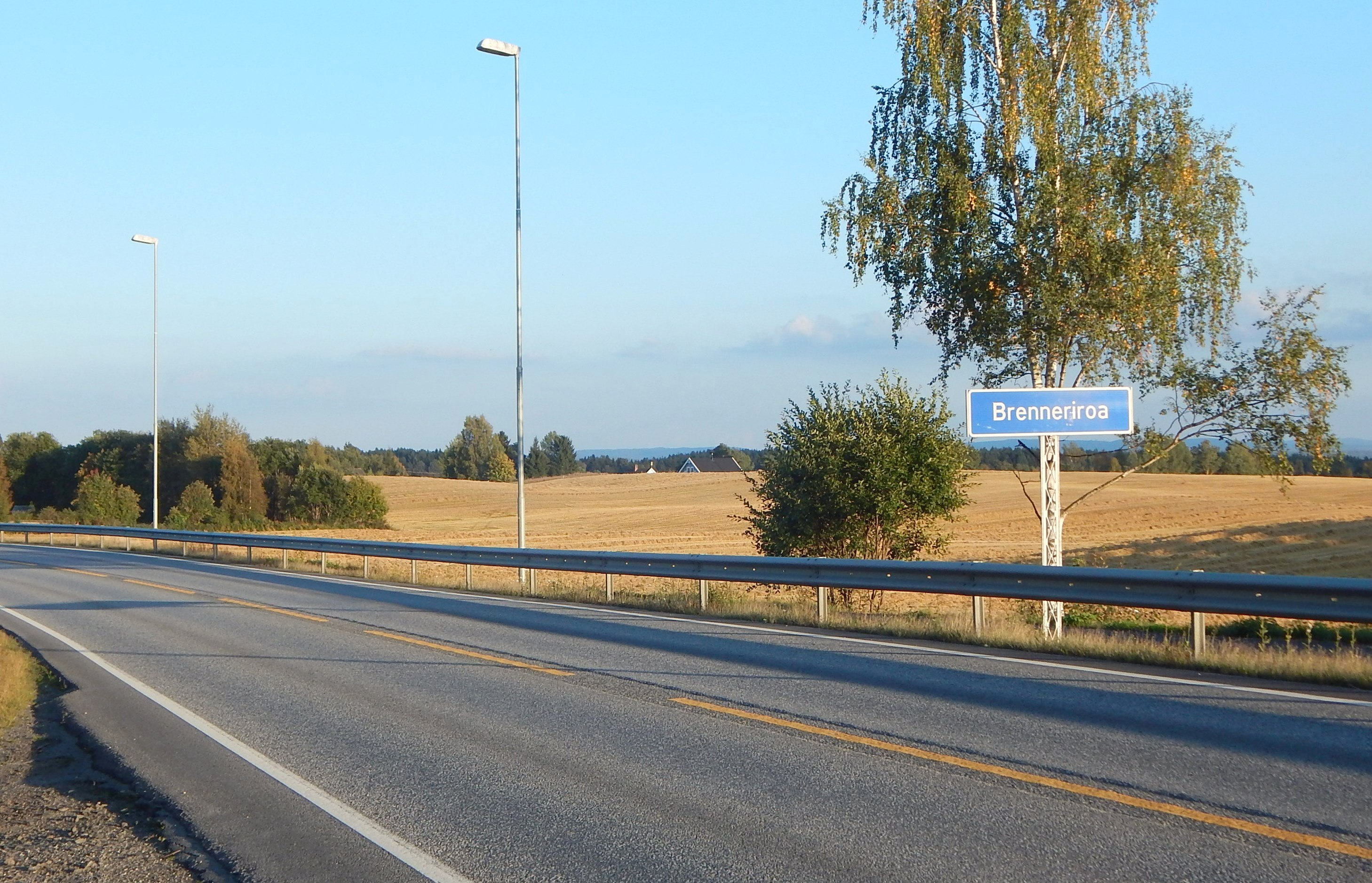 Riksvei 25 ved Brenneriroa i Løten